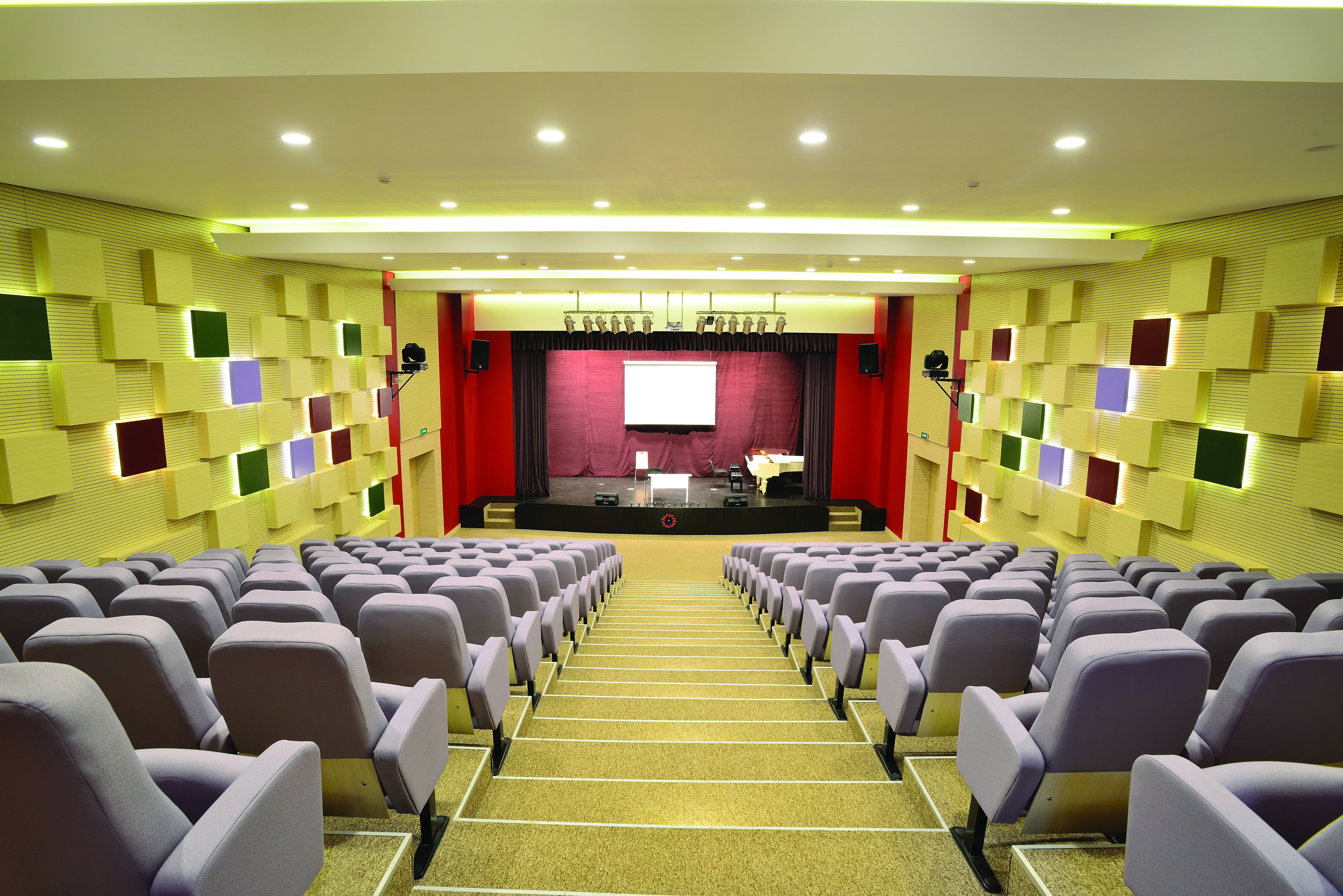 Şamaxı Uşaq Yaradıcılıq Mərkəzi